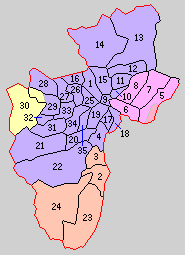 長野県小県郡の町村。